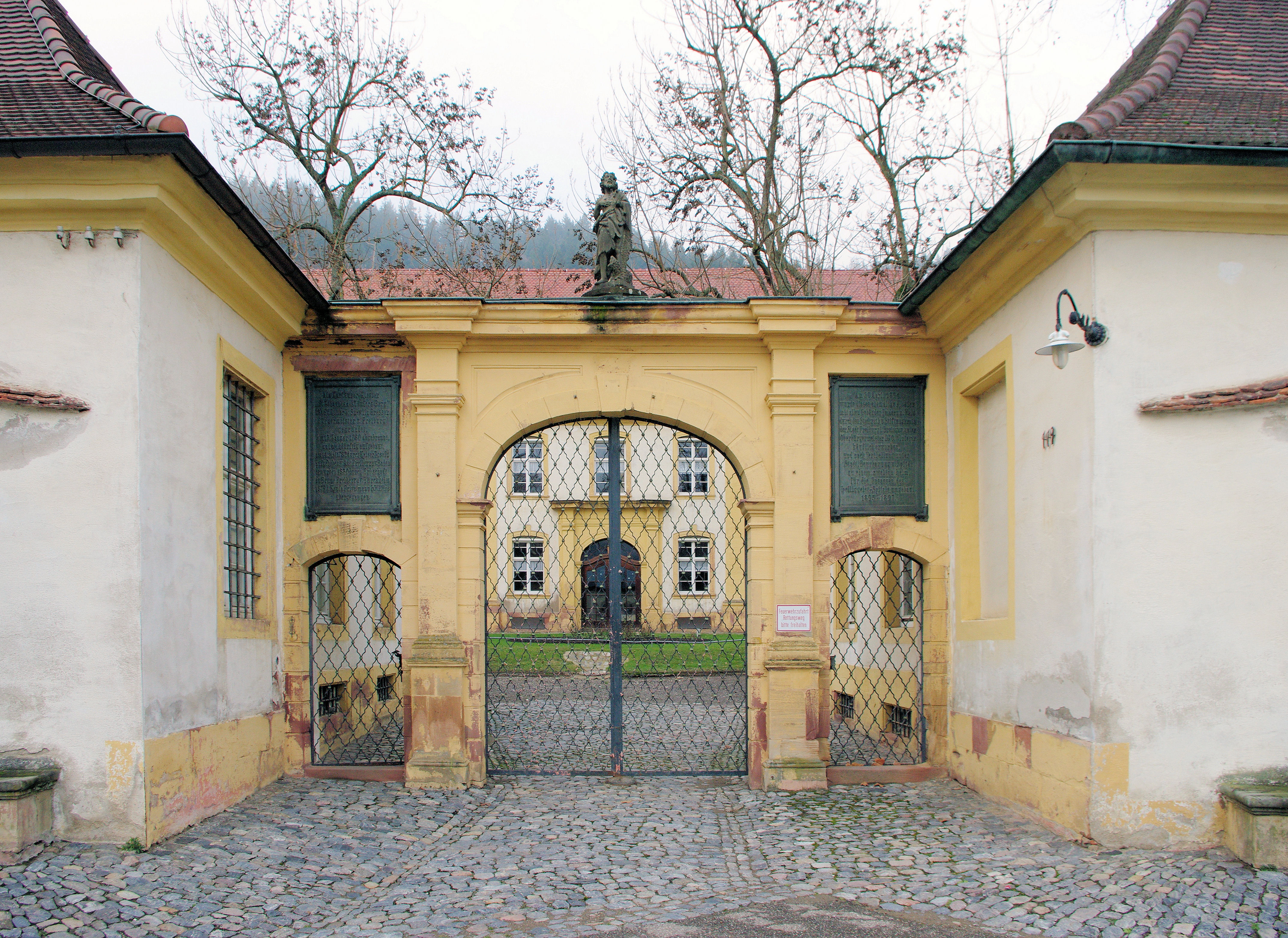 Bilder der Kartause Freiburg